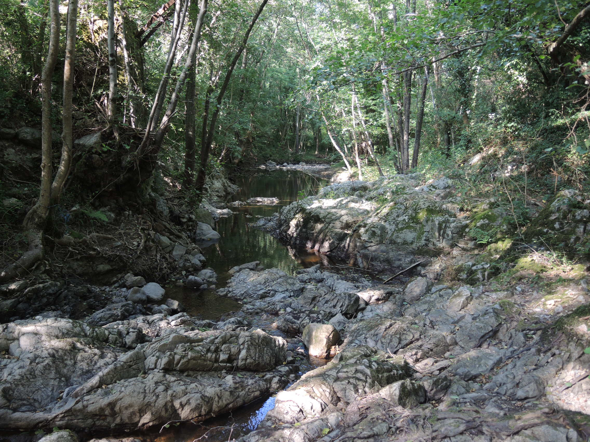 Limony détail